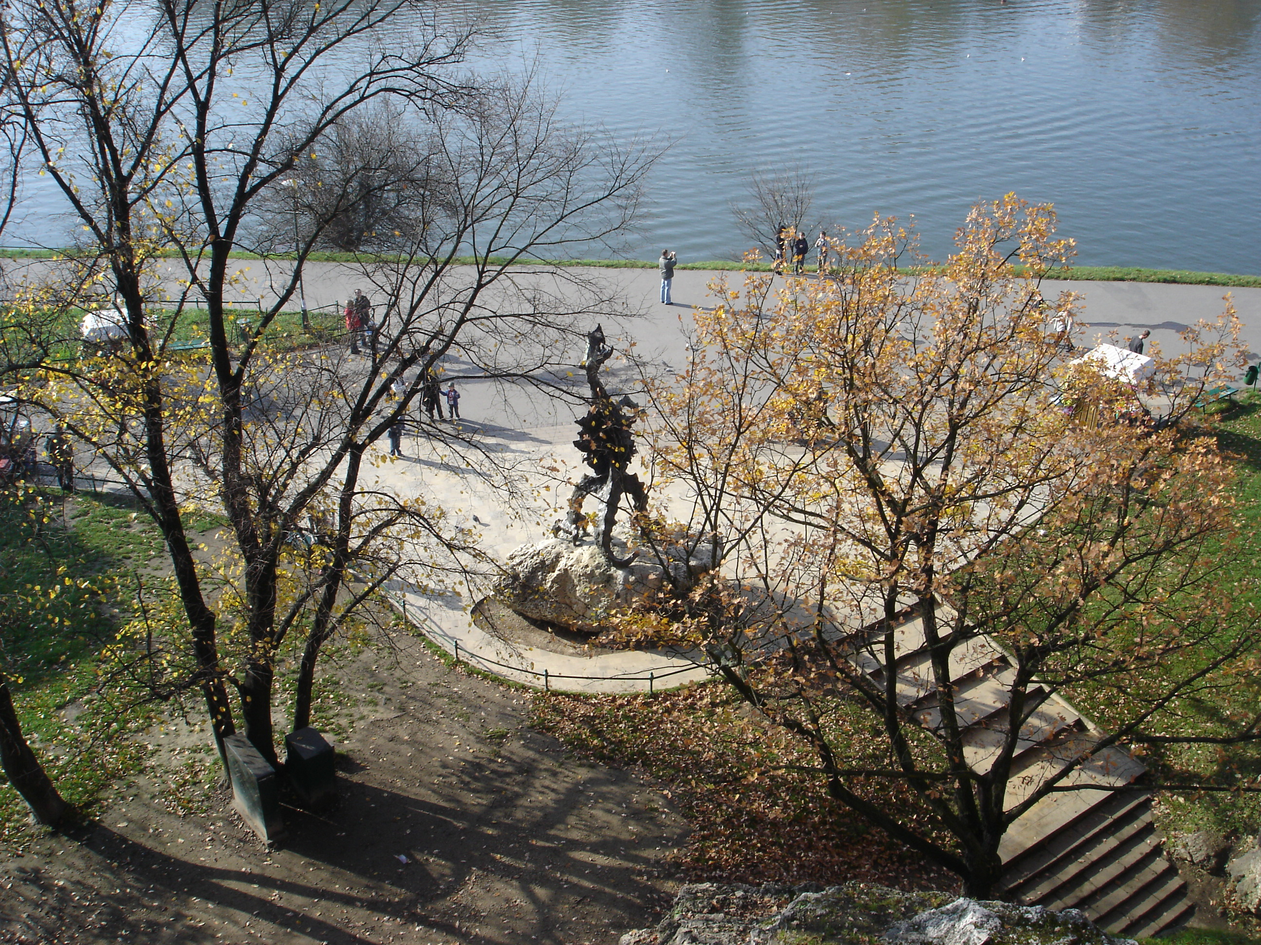 Wawel Drachen von der Wawel aus fotografiert